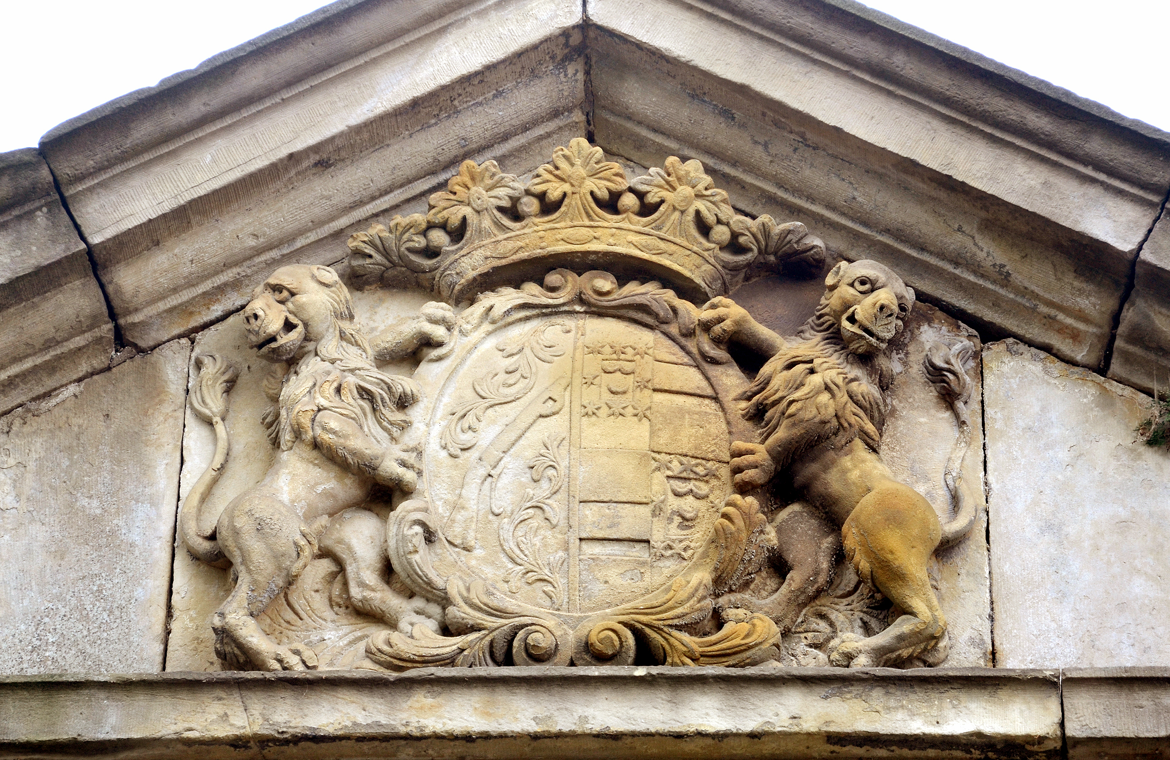 Von zwei Löwen gehaltenes bekröntes Wappen über dem Portal zum Rittergut Bennigsen, das seit mehr als 700 Jahren Stammsitz des niedersächsischen Adelsgeschlechtes von Bennigsen ist ...